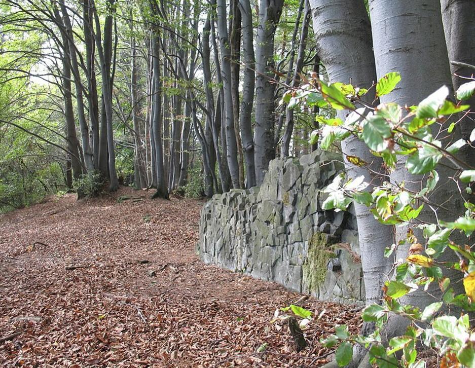 Fragment "zdi", který zbyl po těžbě čediče